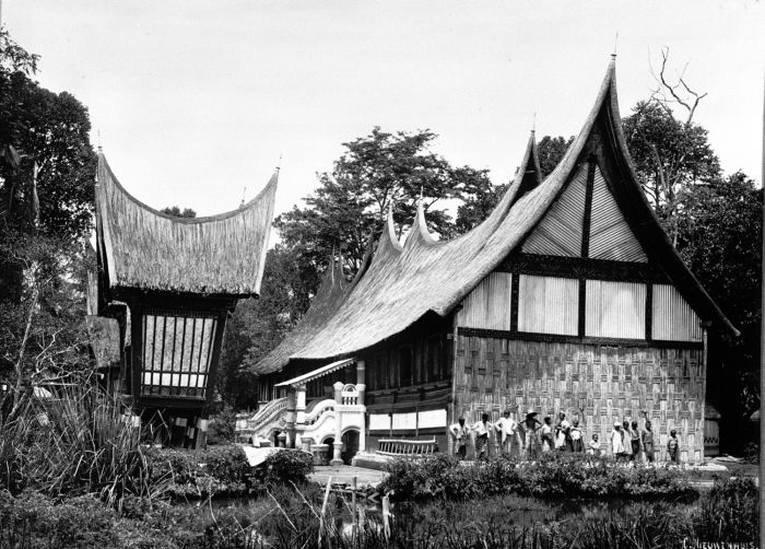 Foto. Een Minangkabau huis met rijstschuren